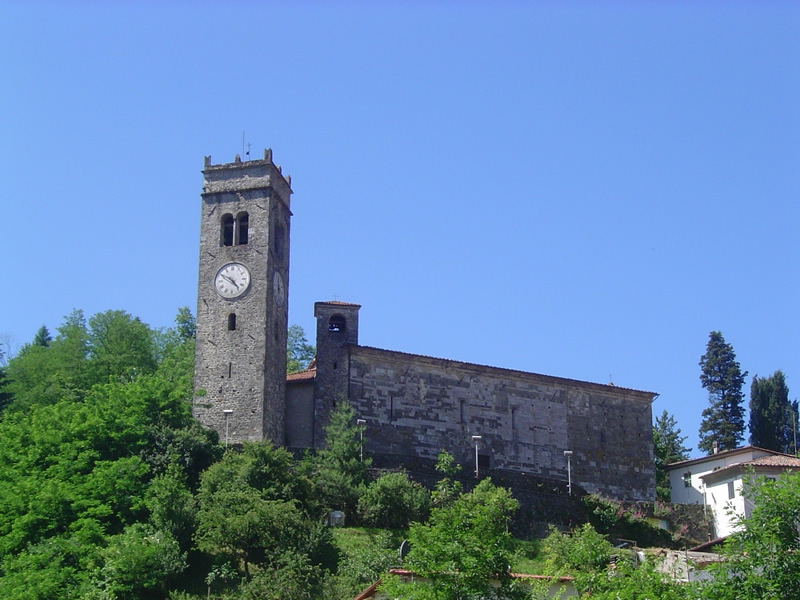 Veduta della chiesa di San Jacopo a Gallicano